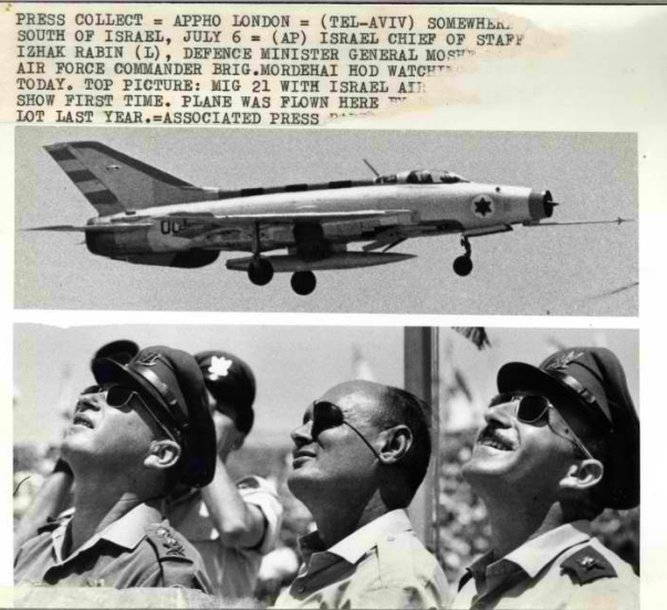 הרמטכ"ל יצחק רבין, שר הבטחון משה דיין ומפקד חיל-האויר מרדכי הוד צופים במפגן אוירי בו הוצג לראשונה מטוס מיג 21